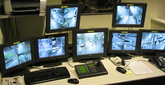 Monitoren voor cameratoezicht in Alkmaar.